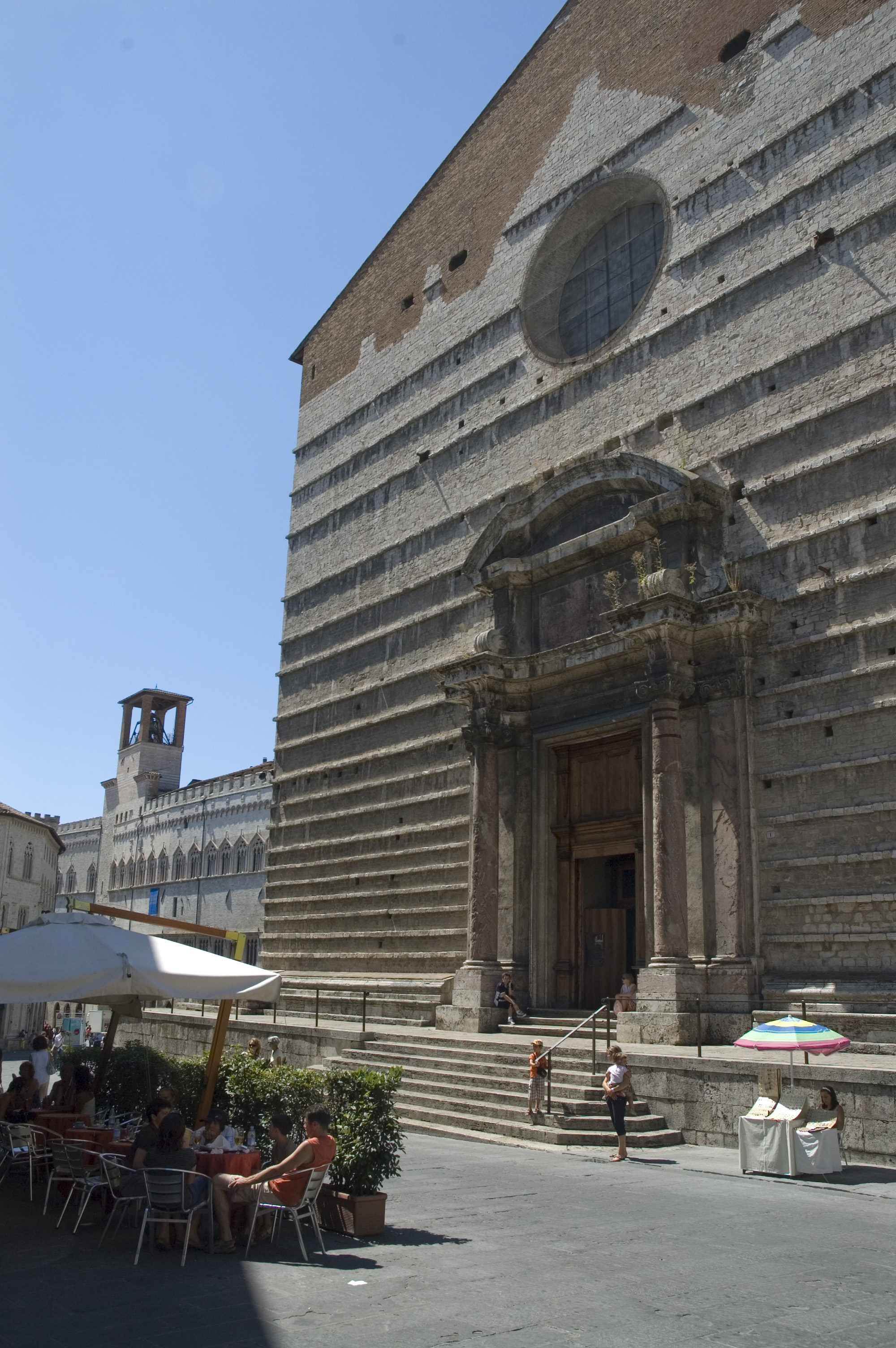 Portail baroque de la façade incomplète.